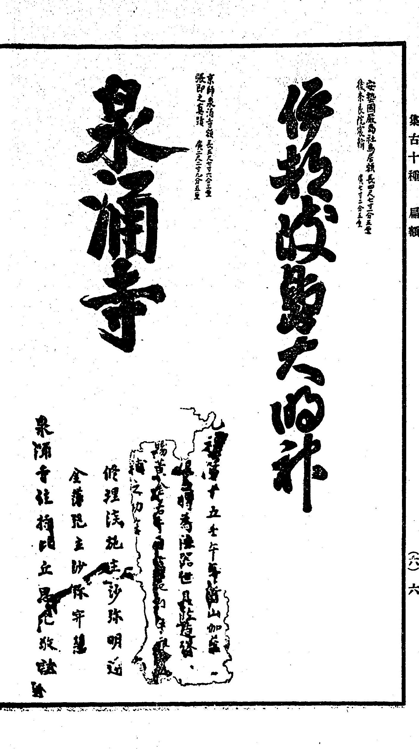 『集古十種 扁額之部』再刊版 伊都岐島大明神